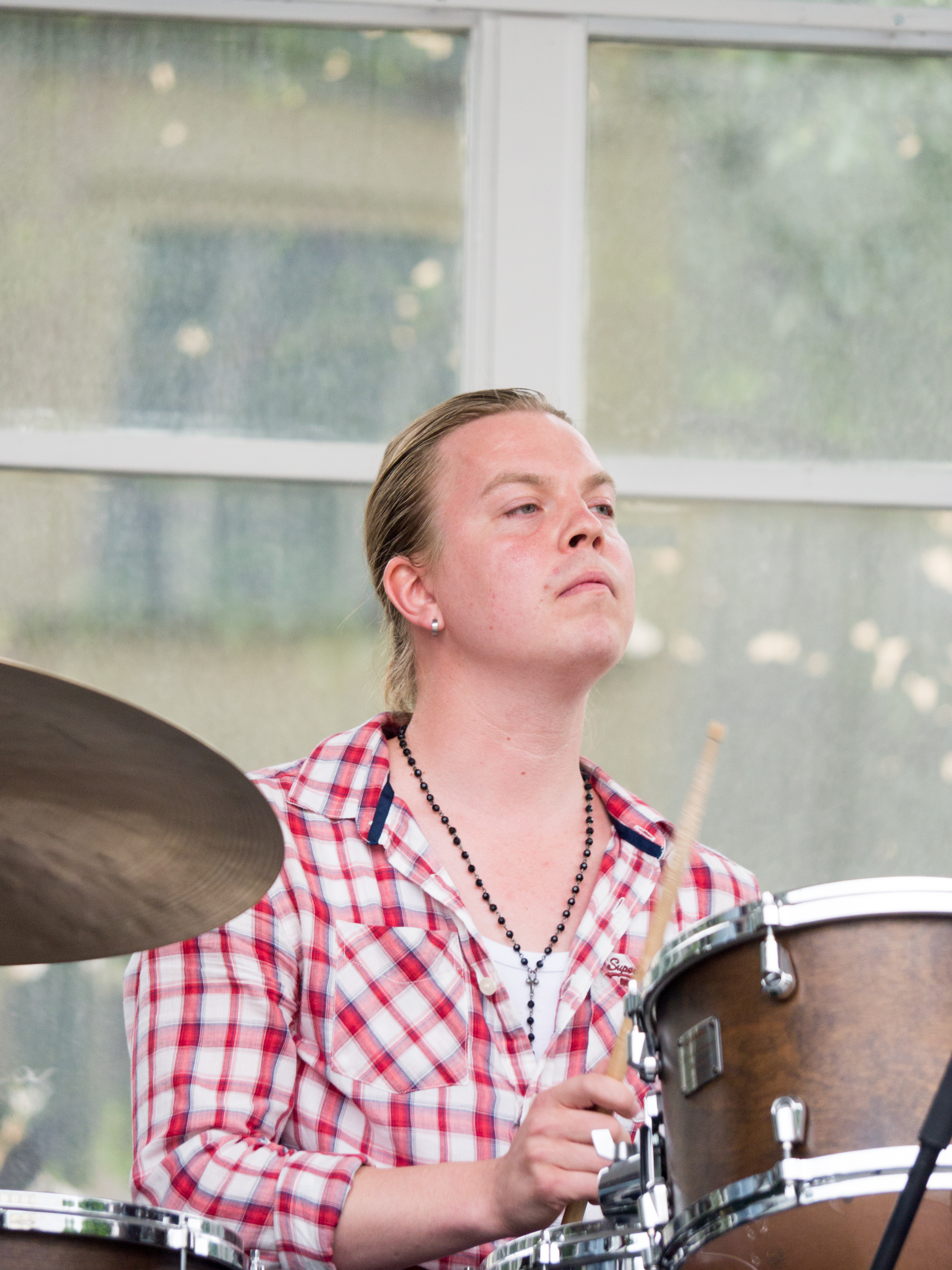 Risto Rikala suomalainen rumpali